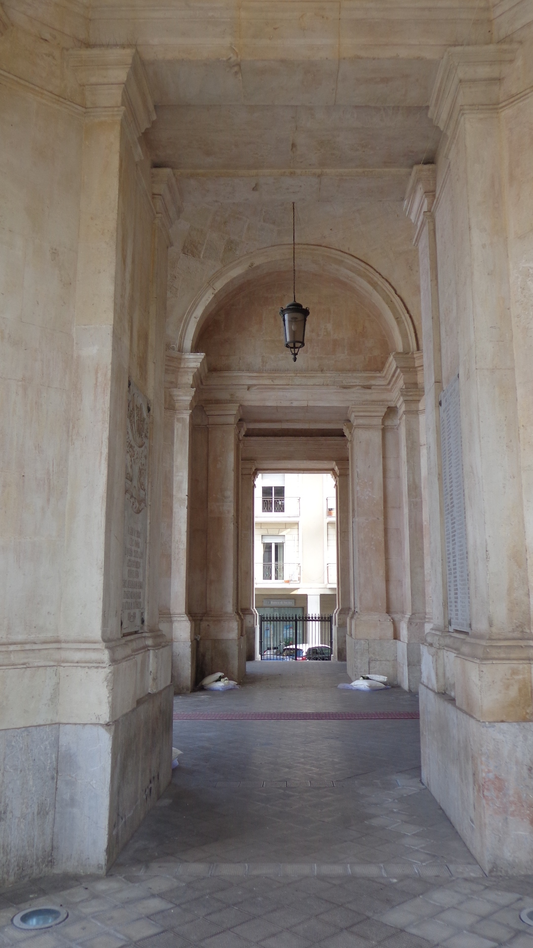 Portico